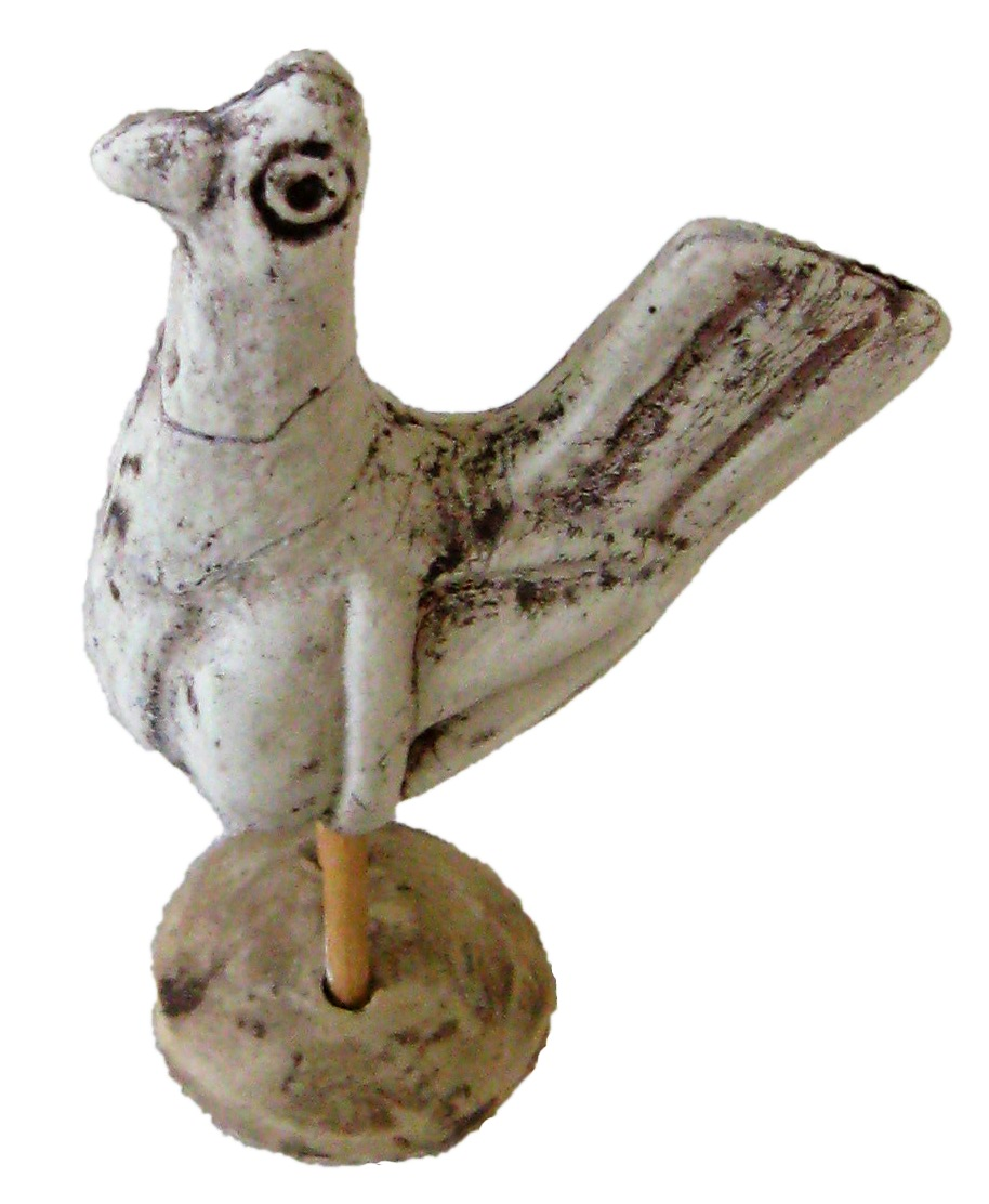 Spielzeug als Grabbeigabe im Pachtener Museum.